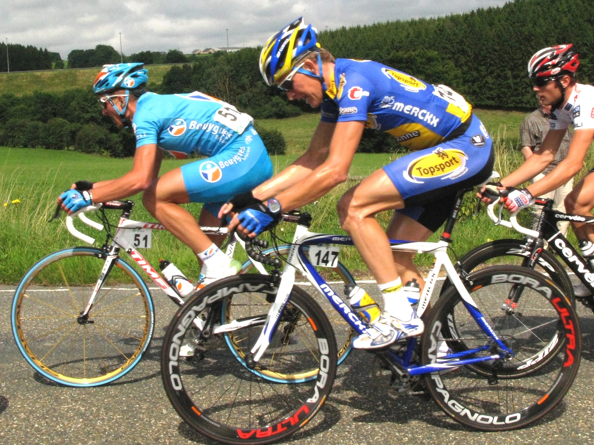 De Kurt Hovelynck mat dem Dossard 147 an den Dimitri Champion mat dem Dossard 51 am Tour de Wallonie 2008. Hovelynck